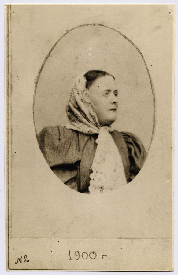 Анна Васильевна Морозова (1834 - 1919) - мать Н.А. Морозова